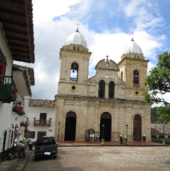 Iglesia Tenza Boyaca